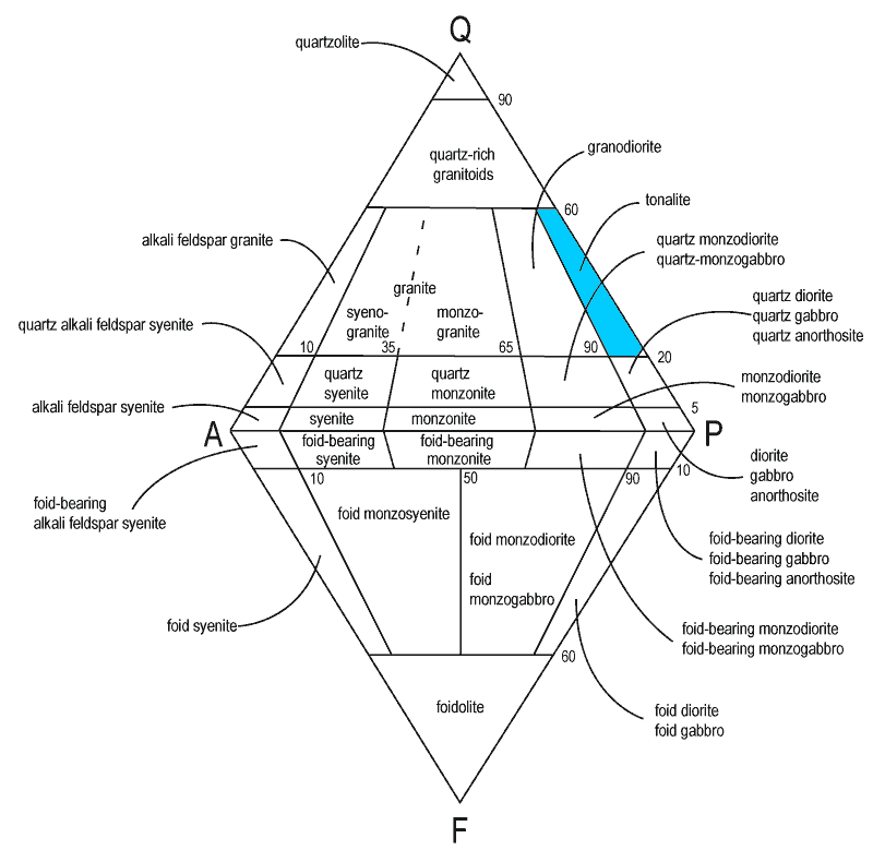 Tonalite in QAPF diagram